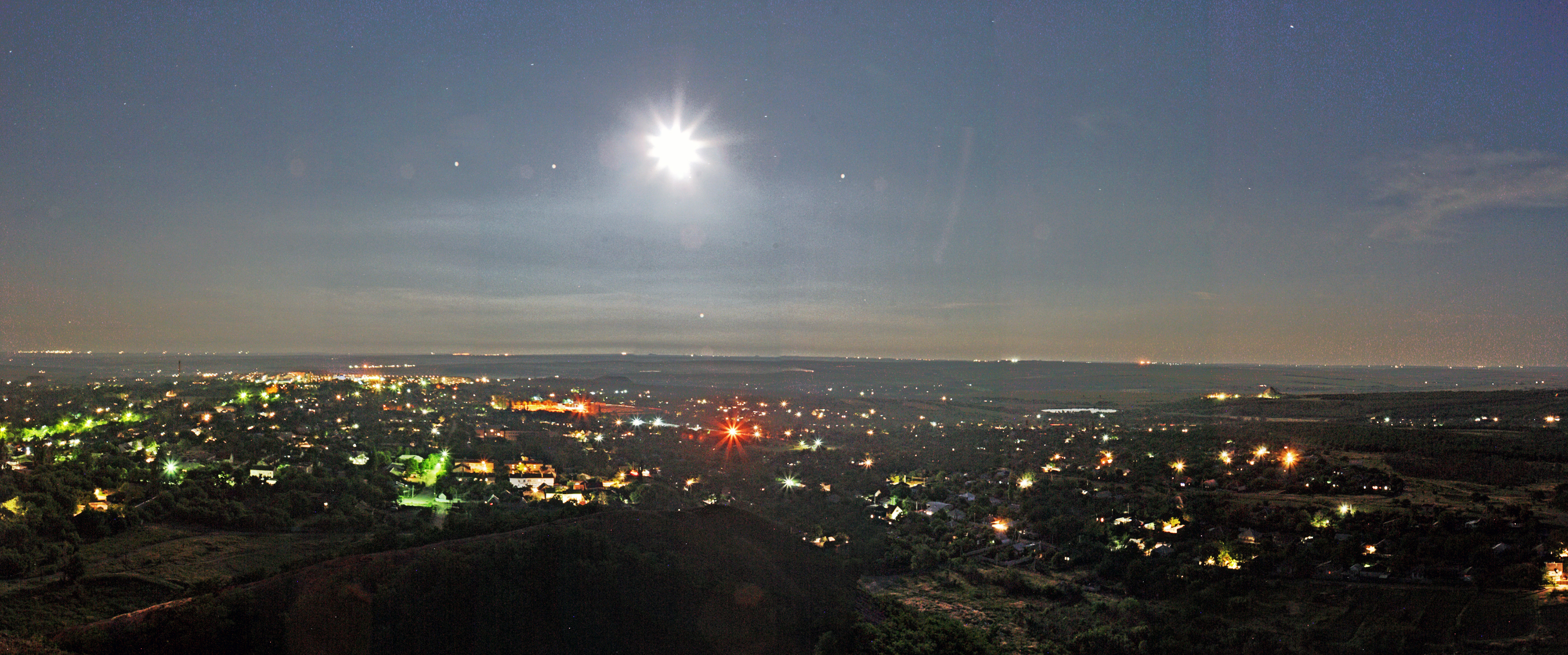 Краснодон в лунном свете